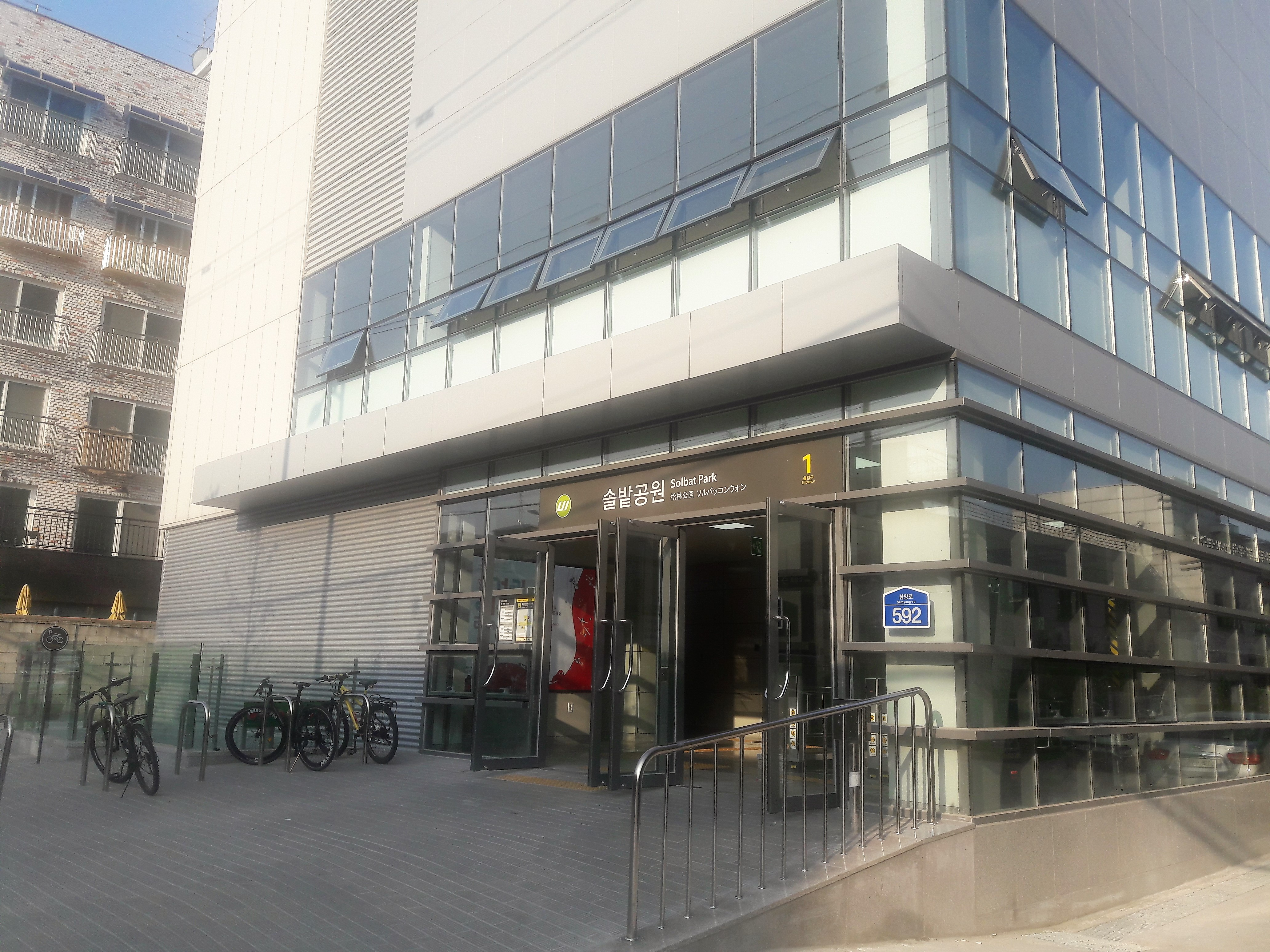 솔밭공원역 1번 출구